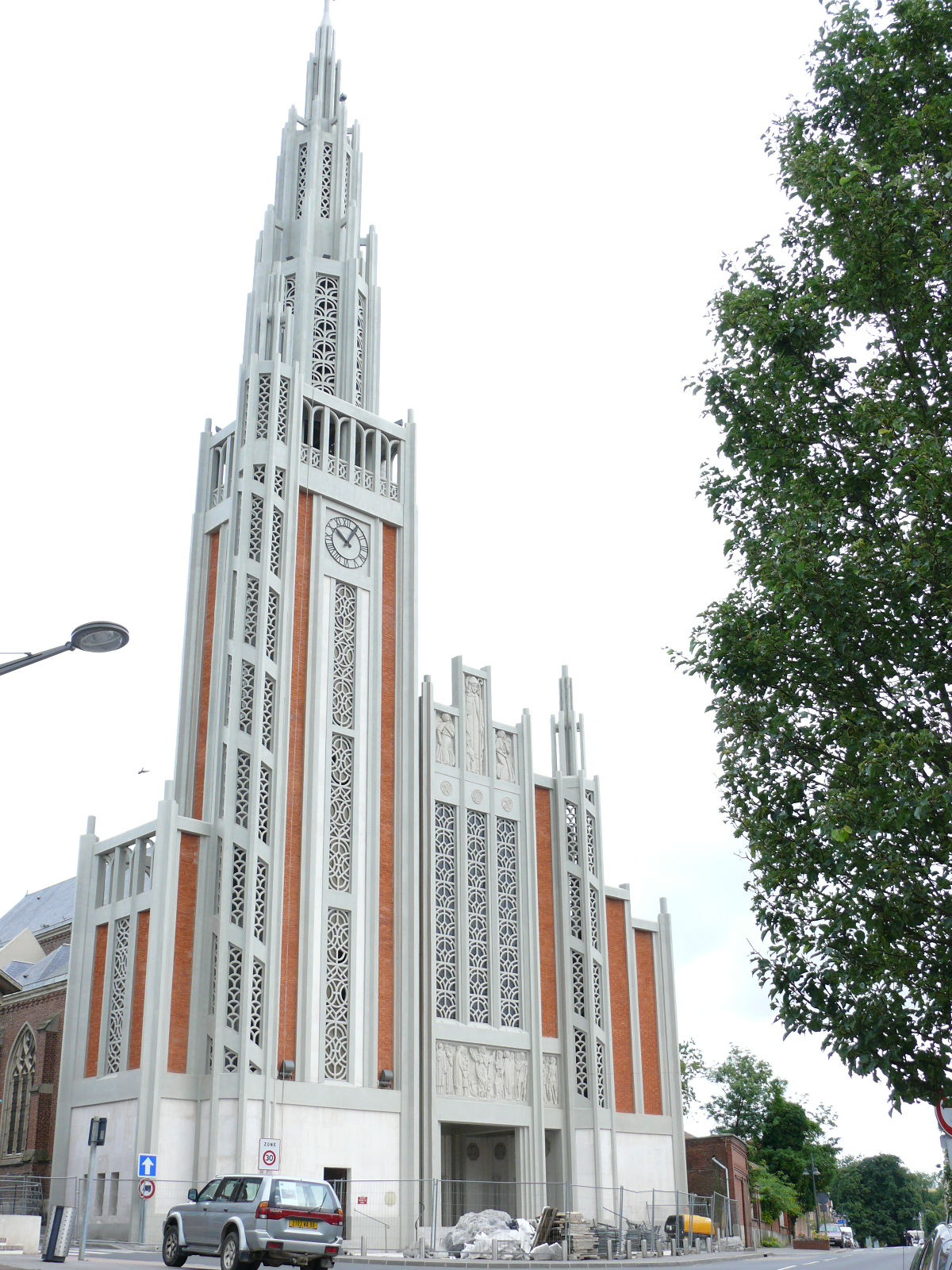 Moreuil (Somme - Picardie - France) : le clocher moderne de l'église Saint-Vaast, conçu par les architectes Duval et Gonse